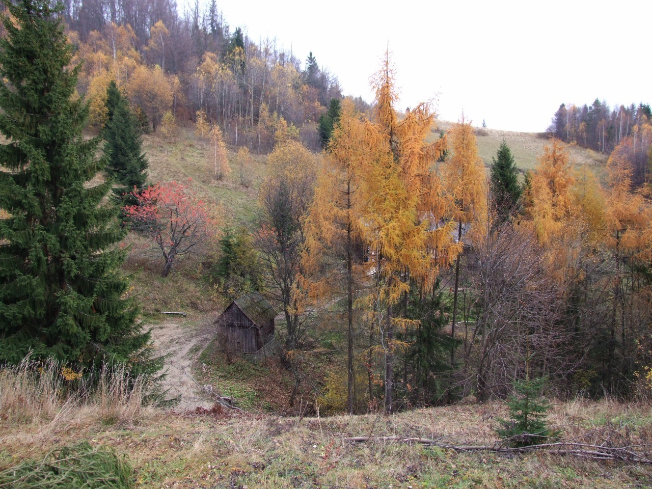 Otoczenie schroniska "Hawiarska Koliba" w Gorcach.